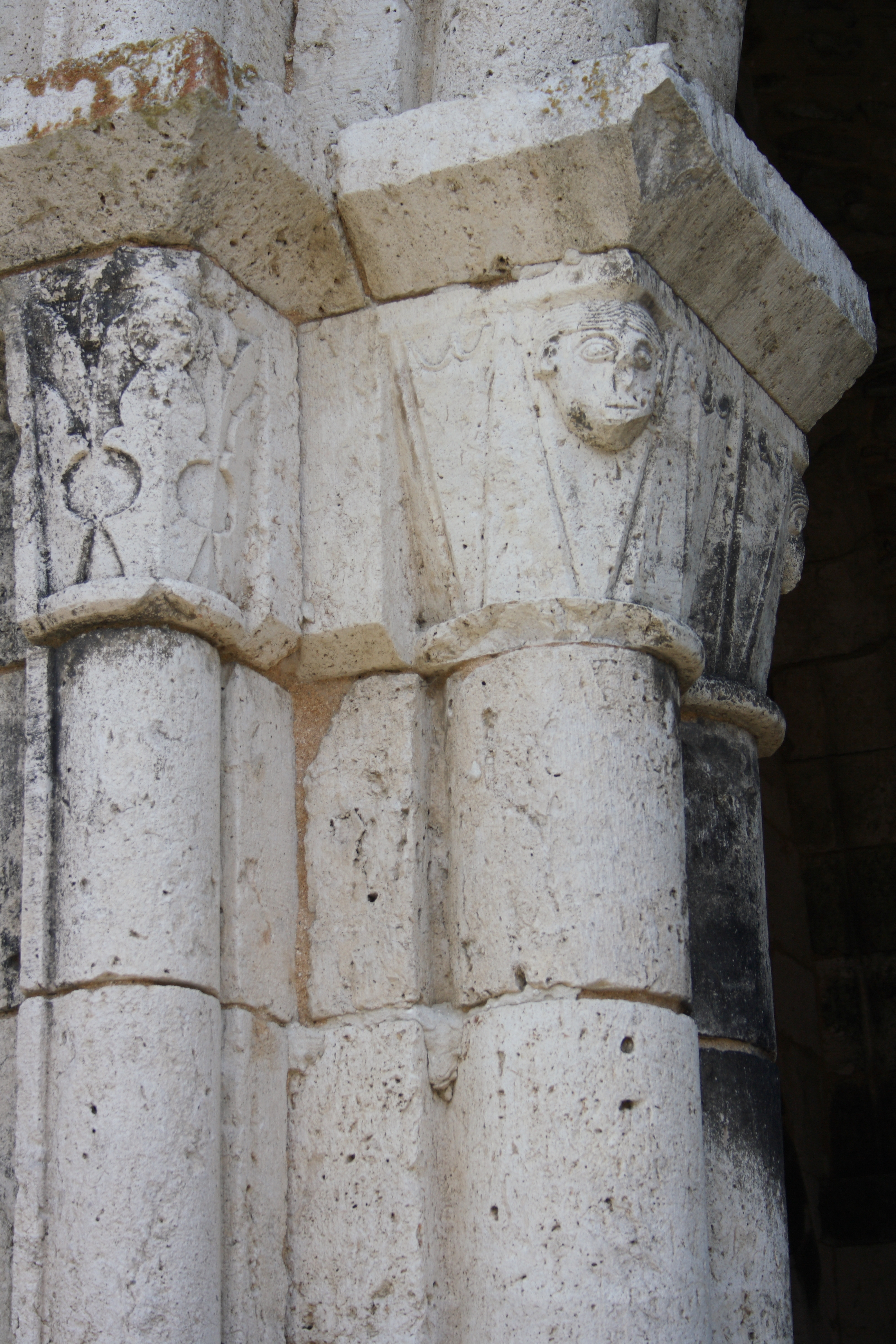 Ehemaliges Priorat Saint-André in Château-Landon, einer Gemeinde im Département Seine-et-Marne (Île-de-France), aus der Mitte des 12. Jahrhunderts, romanische Kapitelle am Portal